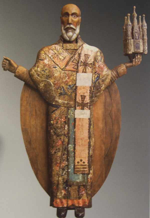 Скульптурная выява святога Міколы Цудатворца. Іканаграфічны тып - Мікола Мажайскі. Прынесена ў Пскоў у 1540 годзе "старцамі-пераходцамі з іншых зямель".